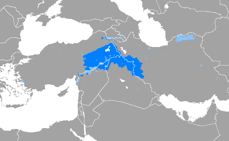 تۆرکجه: کورد دیلی‌نین یاییلدیغی اراضیلر.